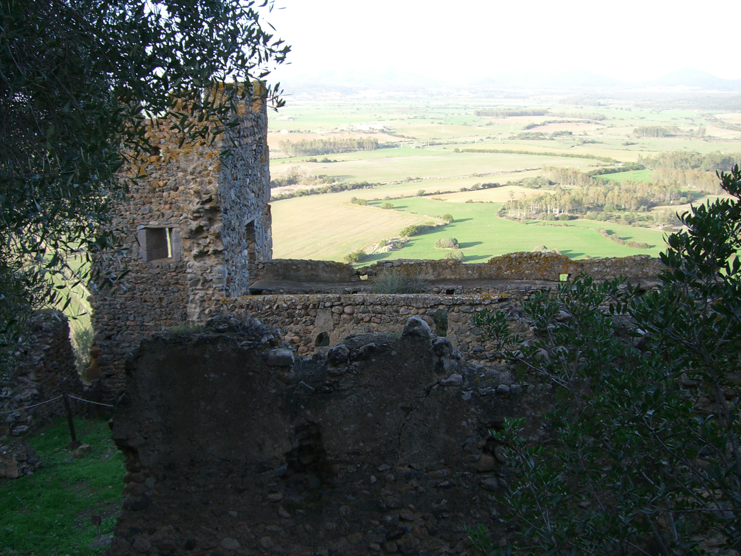 Mura del Castello di Acquafredda, XIIIe secolo, (Sardegna) (CA)